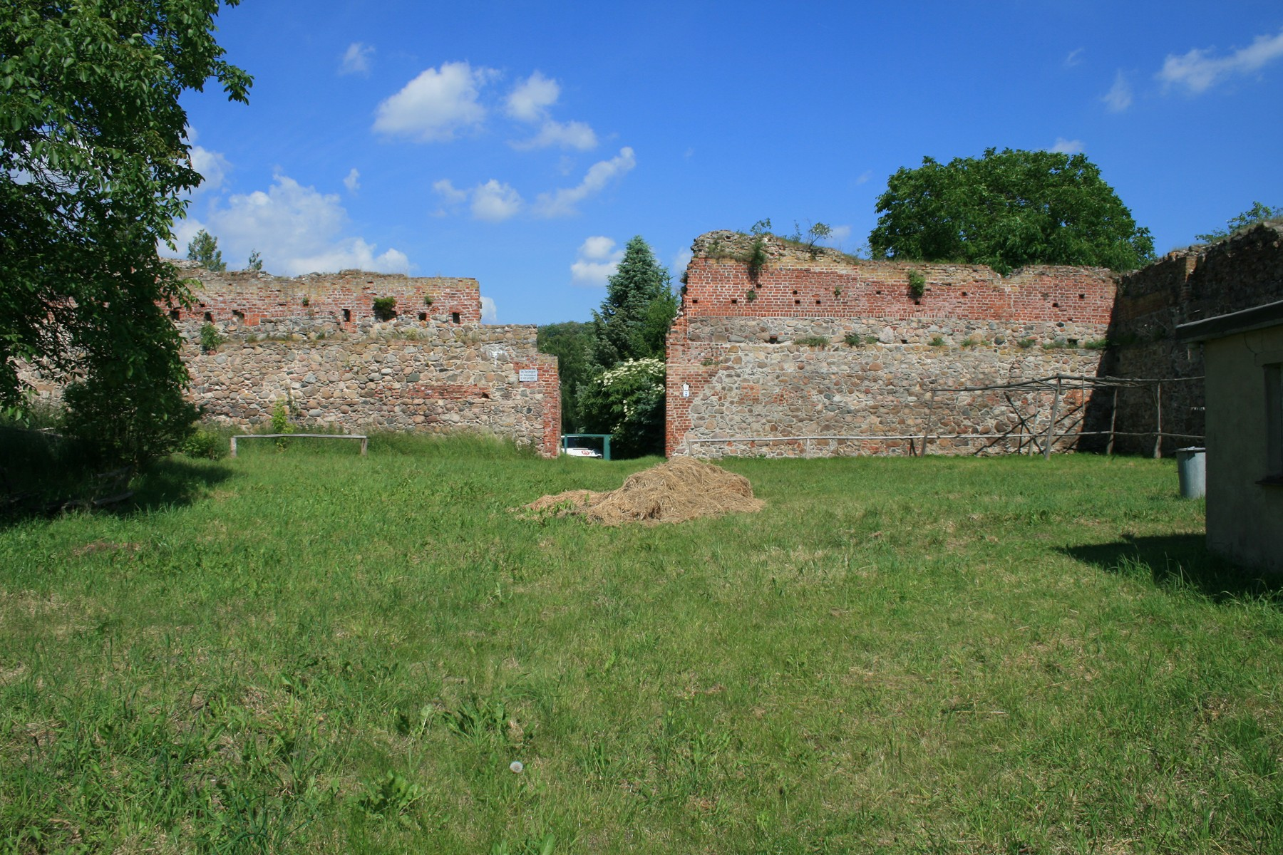 Baudenkmale in Oderberg: Festung Bärenkasten